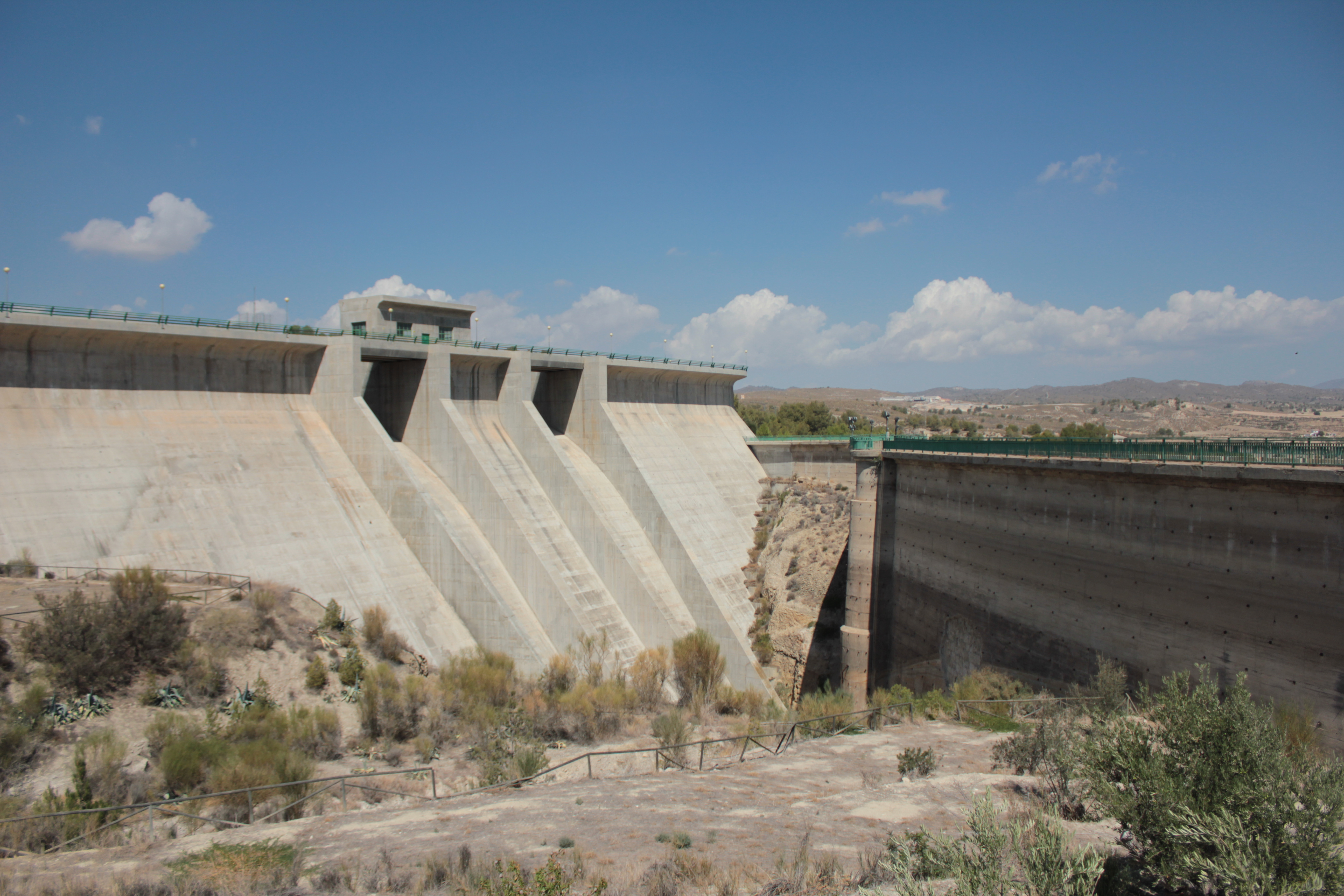 Vista de las Presas de Puentes III y IV